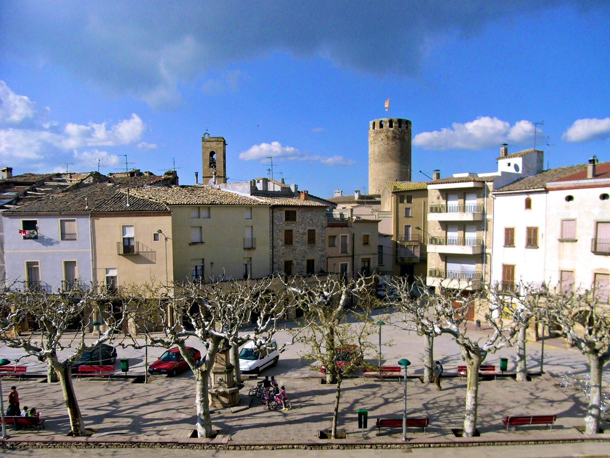 Plaça de Verdú des del Museu de les Joguines